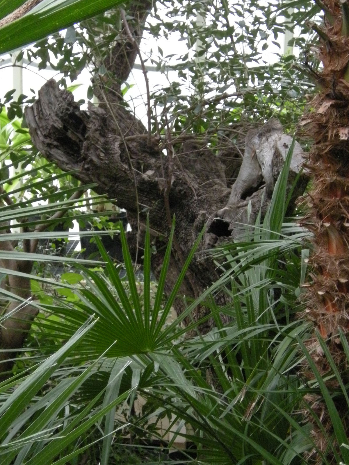 Palm house at Schönbrunn, Vienna